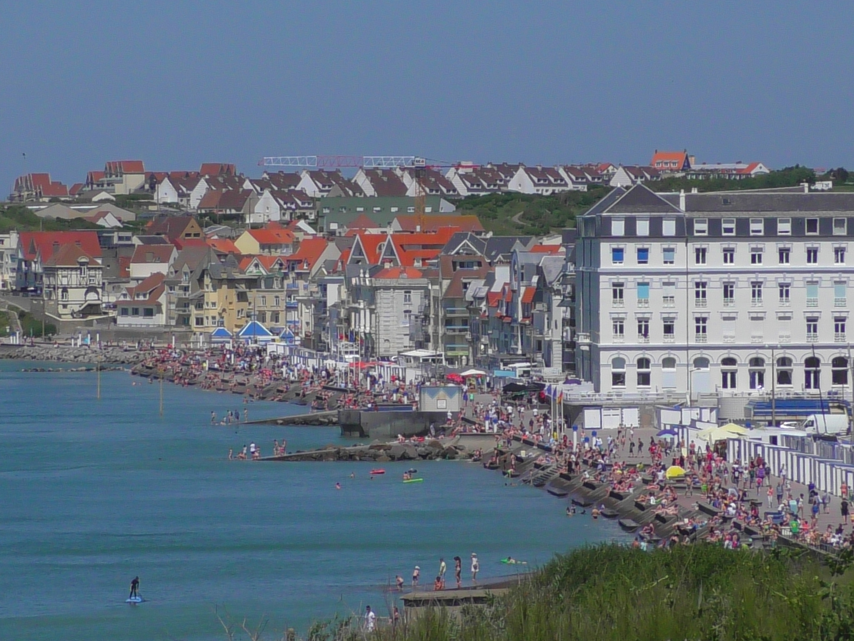 Wimereux, Pas-de-Calais, France